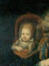 Nicholas Henri, Duke of Orléans (1607-1611)label QS:Len,"Nicholas Henri, Duke of Orléans (1607-1611)"label QS:Lfr,"Nicolas Henri de France (detail de "La famille de Henri IV")"label QS:Lpl,"Mikolaj Henryk, ksiaze Orleanu"